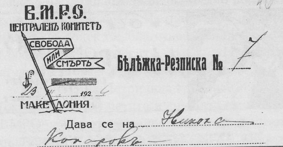 Разписка на Централния комитет на ВМРО.